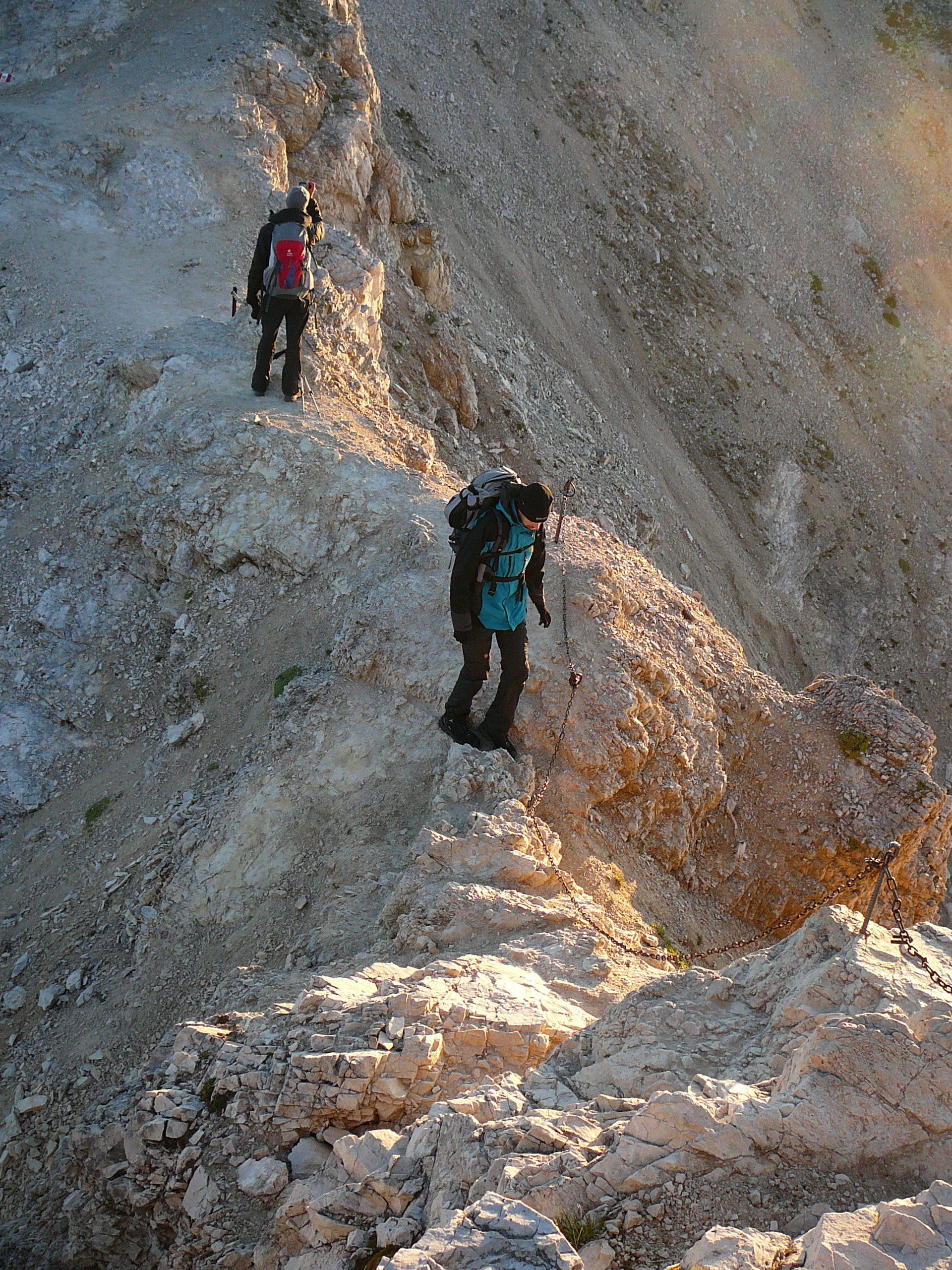 Picco di Vallandro - tratto attrezzato